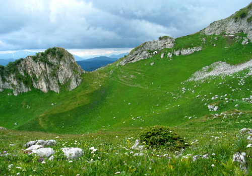 Апшеронск